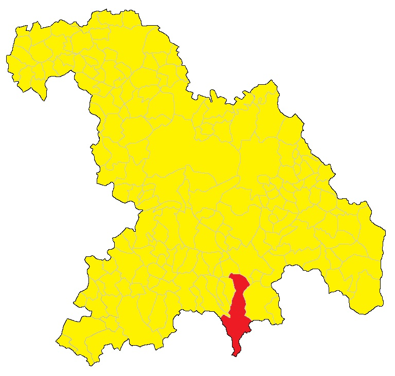 Mappa del comune di Bosio (AL).